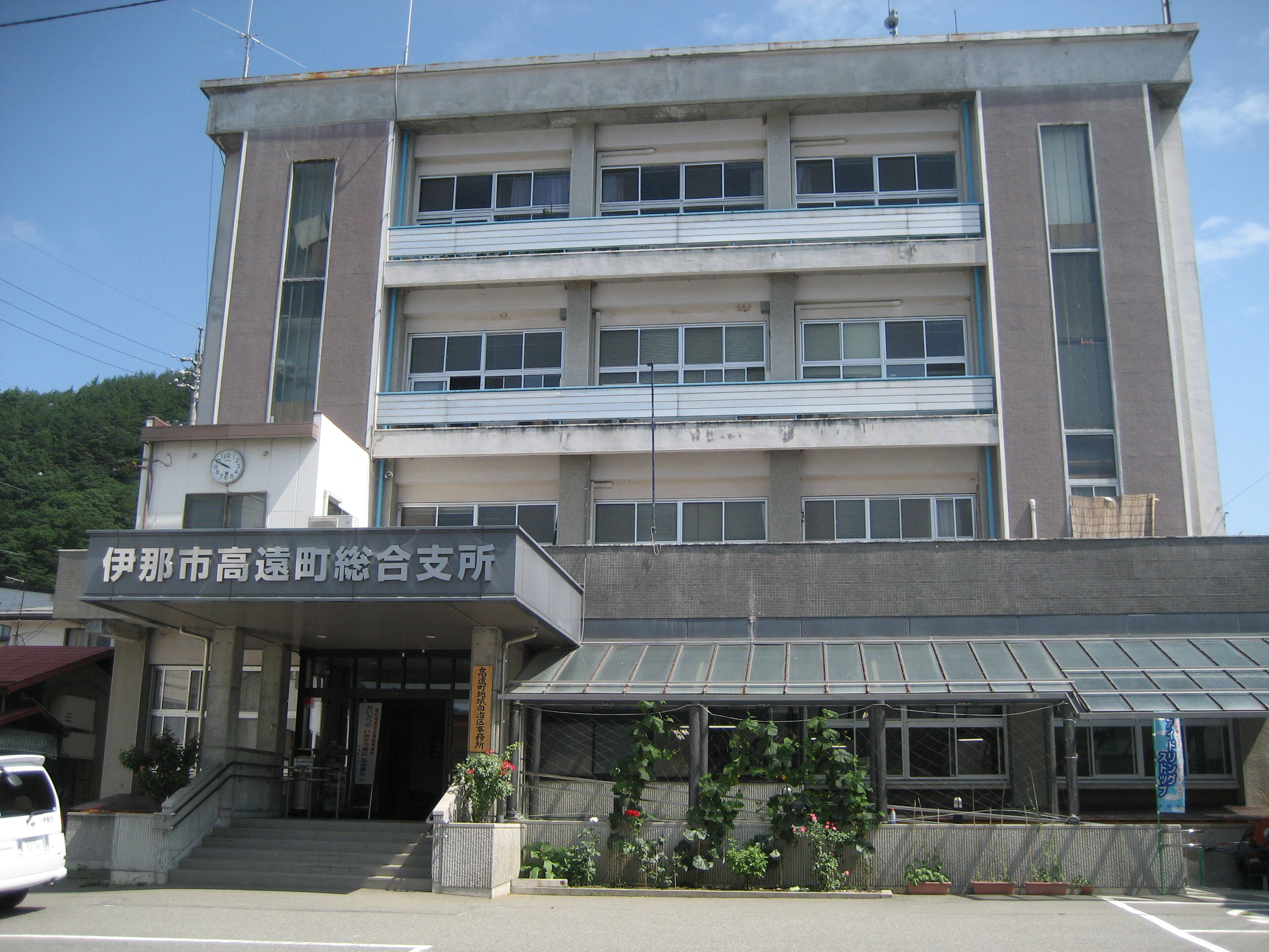 伊那市役所高遠総合支所庁舎（旧高遠町役場）